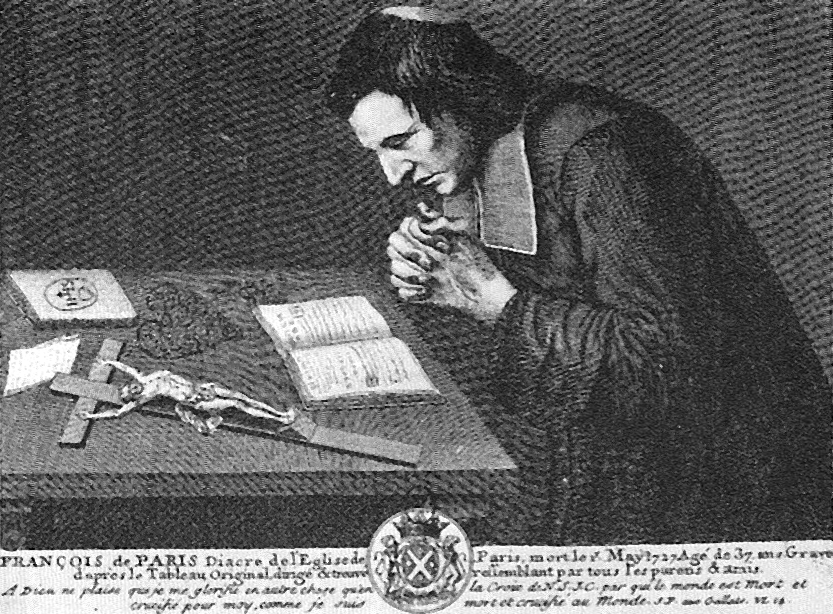 Gravure représentant le diacre Pâris en prière